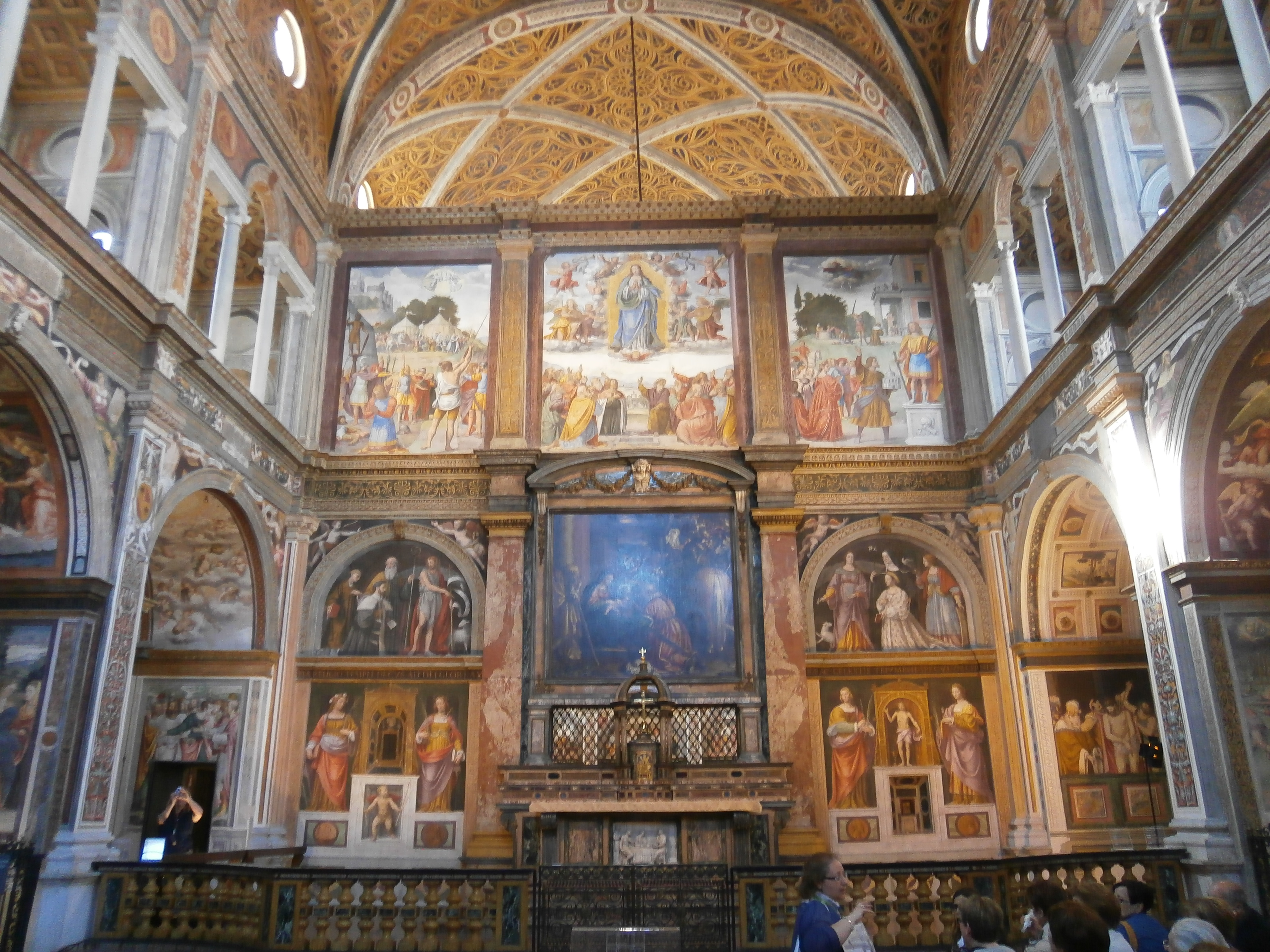 Interno della chiesa di San Maurizio al Monastero Maggiore - Milano - affreschi